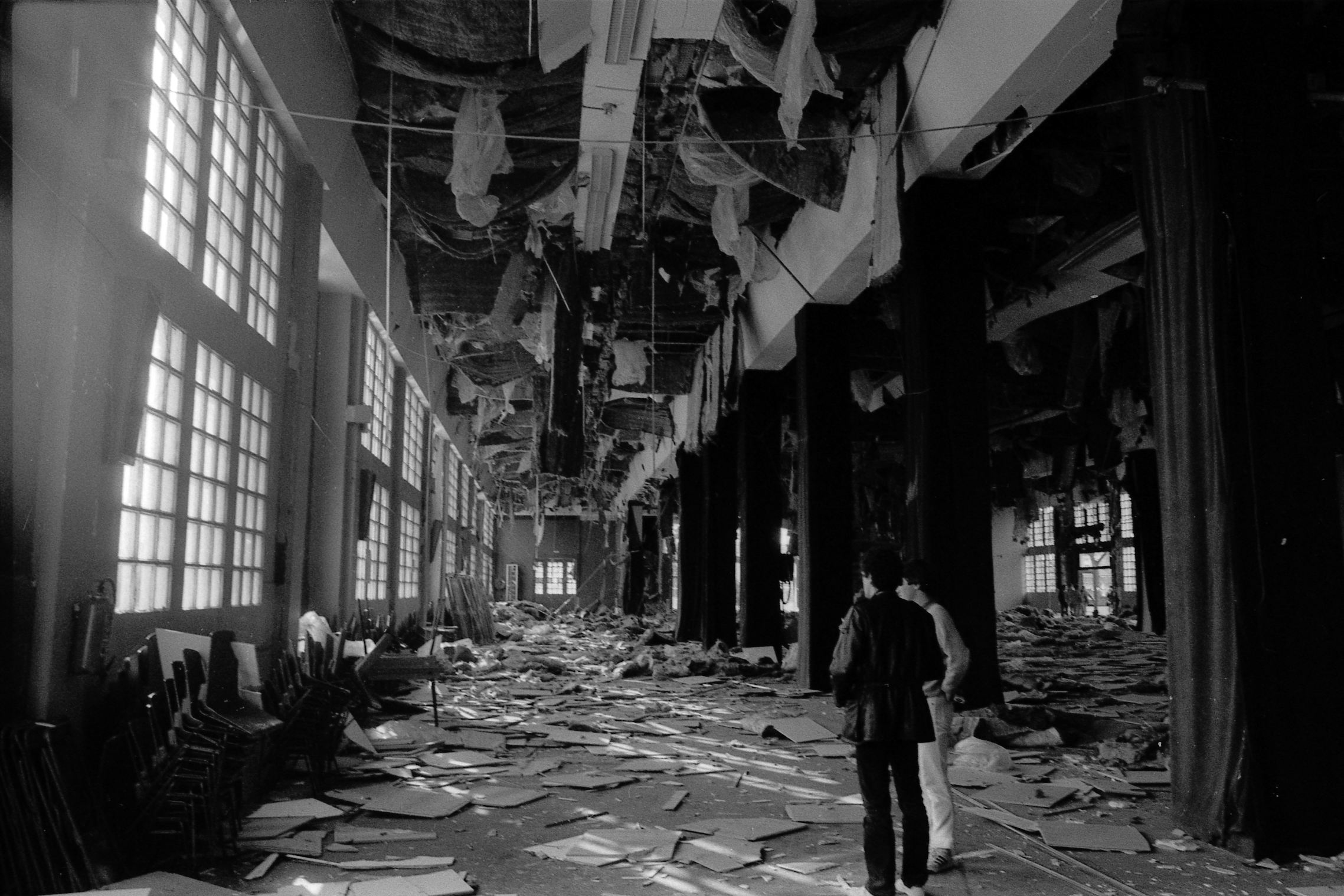 Salle Jean Mermoz (île du Ramier). 4 juin 1984. Vue d'ensemble en perspective d'une partie de l'intérieur de la salle complètement détruit, décombres, morceaux de plafond qui pendent ; au 1er plan deux personnes (vue de dos et de profil) regardent les dégâts. Cliché pris après l'attentat visant la venue de Jean-Marie Le Pen qui devait tenir un meeting dans cette salle le jour même (salle entièrement dévastée par deux engins explosifs).